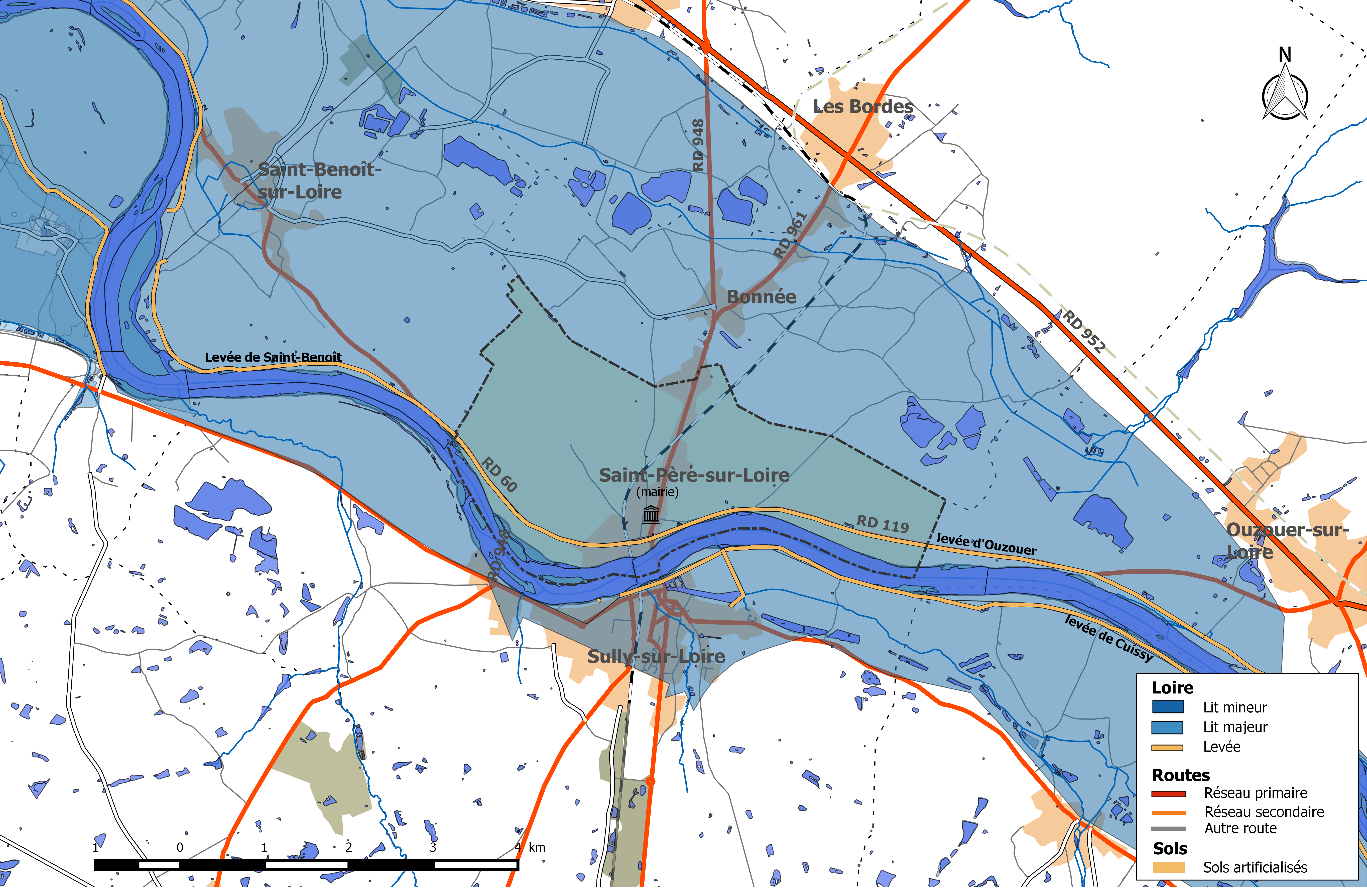 Zone inondable et réseaux hydrographique et routier de la commune de Saint-Père-sur-Loire.